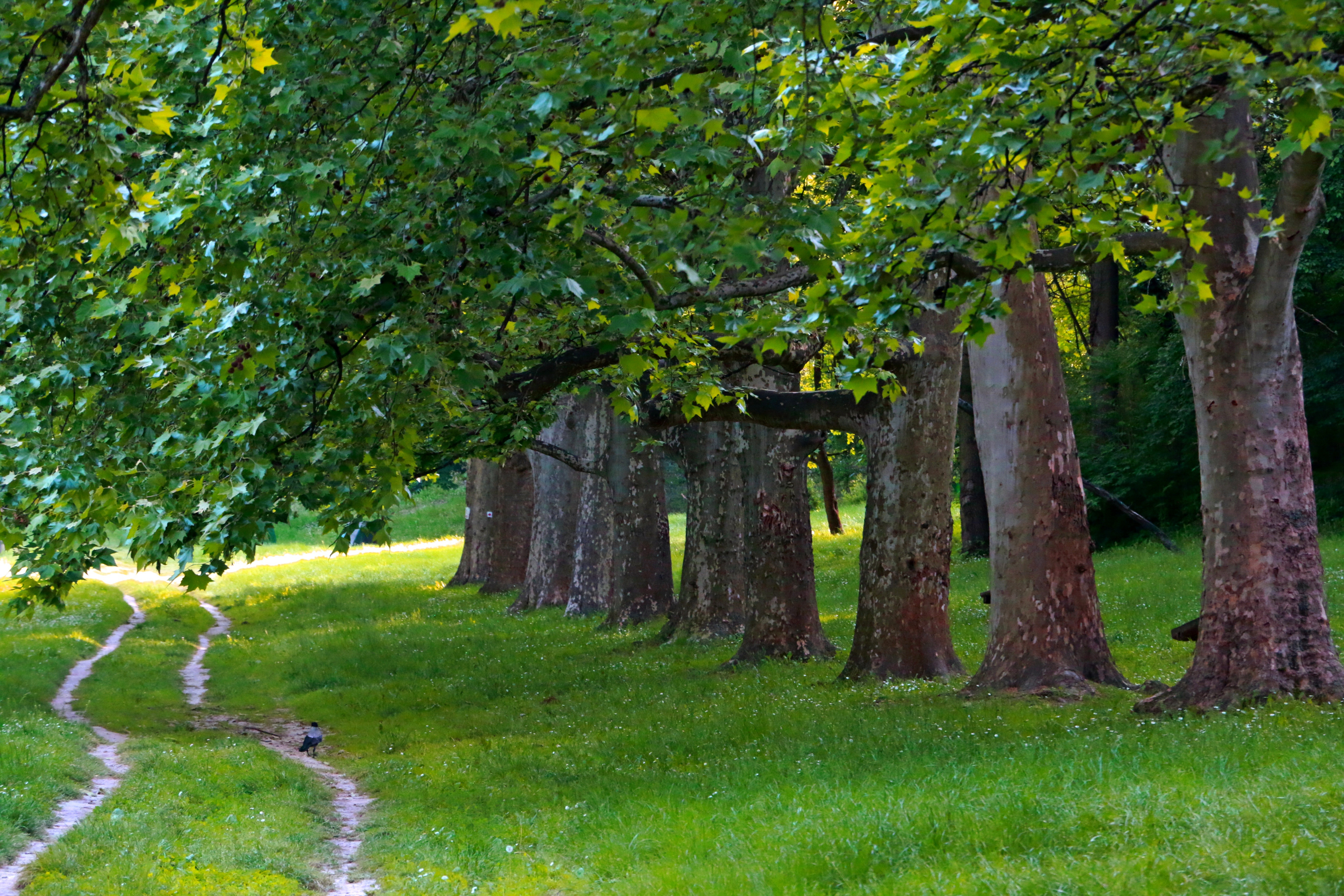 Српски (ћирилица): Ово је фотографија заштићеног природног добра у Србији под шифром: СП036 This is a a photo of a natural area in Serbia with ID: СП036 Drvored platana,Spomenik prirode Šuma Košutnjak